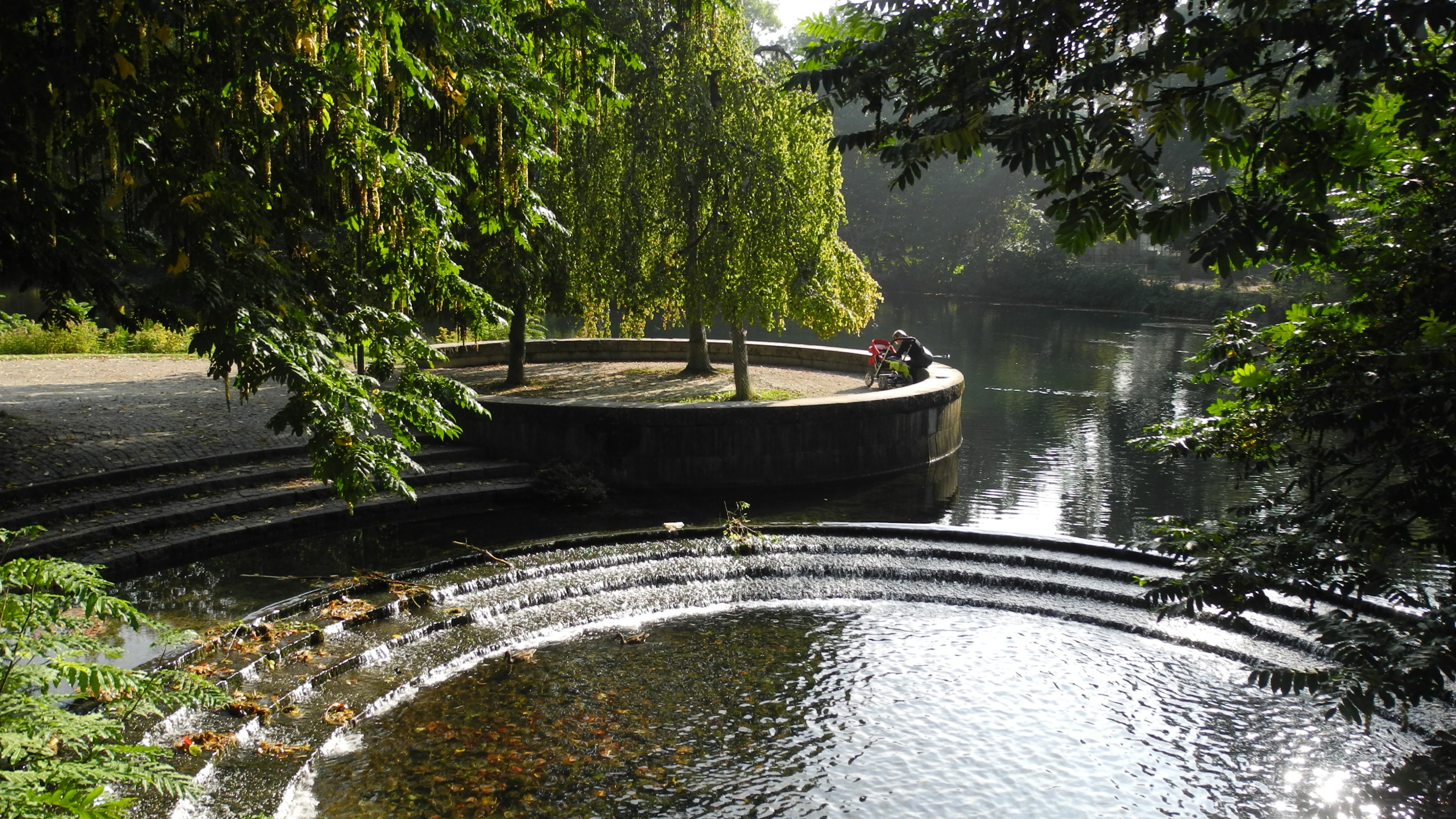 Ulm - Friedrichsau, Wasserspiele